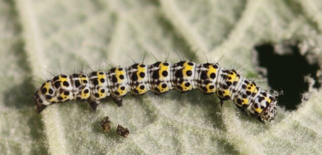 Jungraupe (10 mm lang) des Königskerzen-Mönchs (Cucullia verbasci) an einem Blatt einer Königskerze fressend, am 17. Mai 2018 in der Schwetzinger Hardt